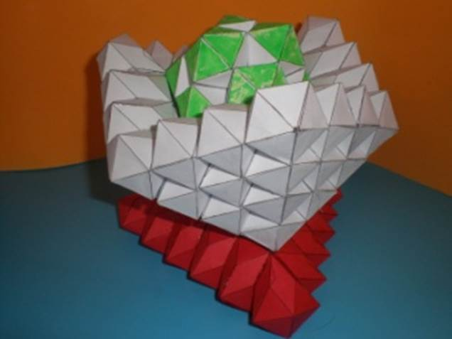 Az első három Almássy-féle ikozaéder réteg részleteinek együttes látványa